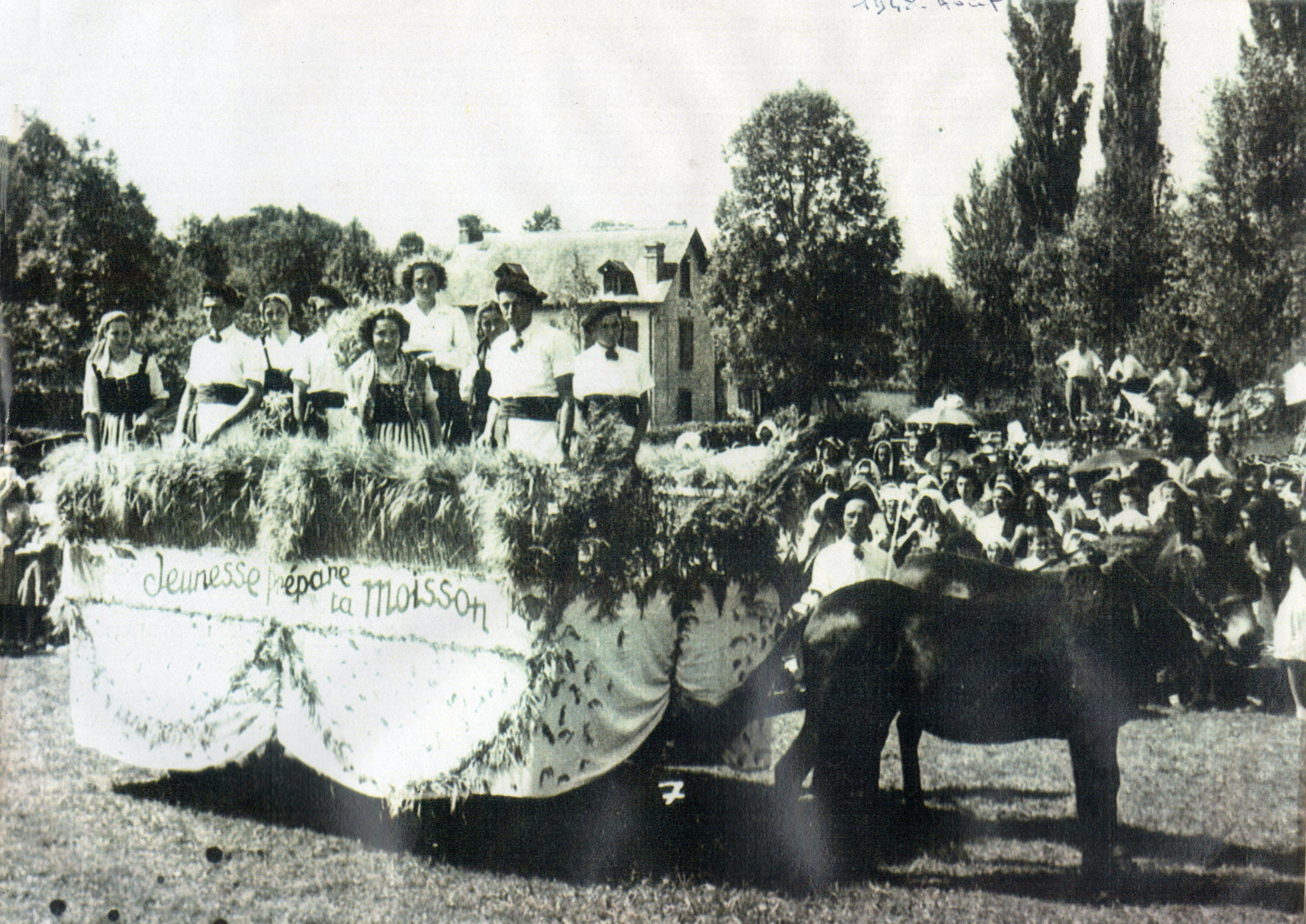 Char fleuri lors de la fête de la Terre organisée dans le village des Angles (Hautes-Pyrénées) par la JAC (Jeunesse Agricole Catholique) du canton de Lourdes. Sont présents sur le char, des jeunes ruraux de Bourréac et de Paréac